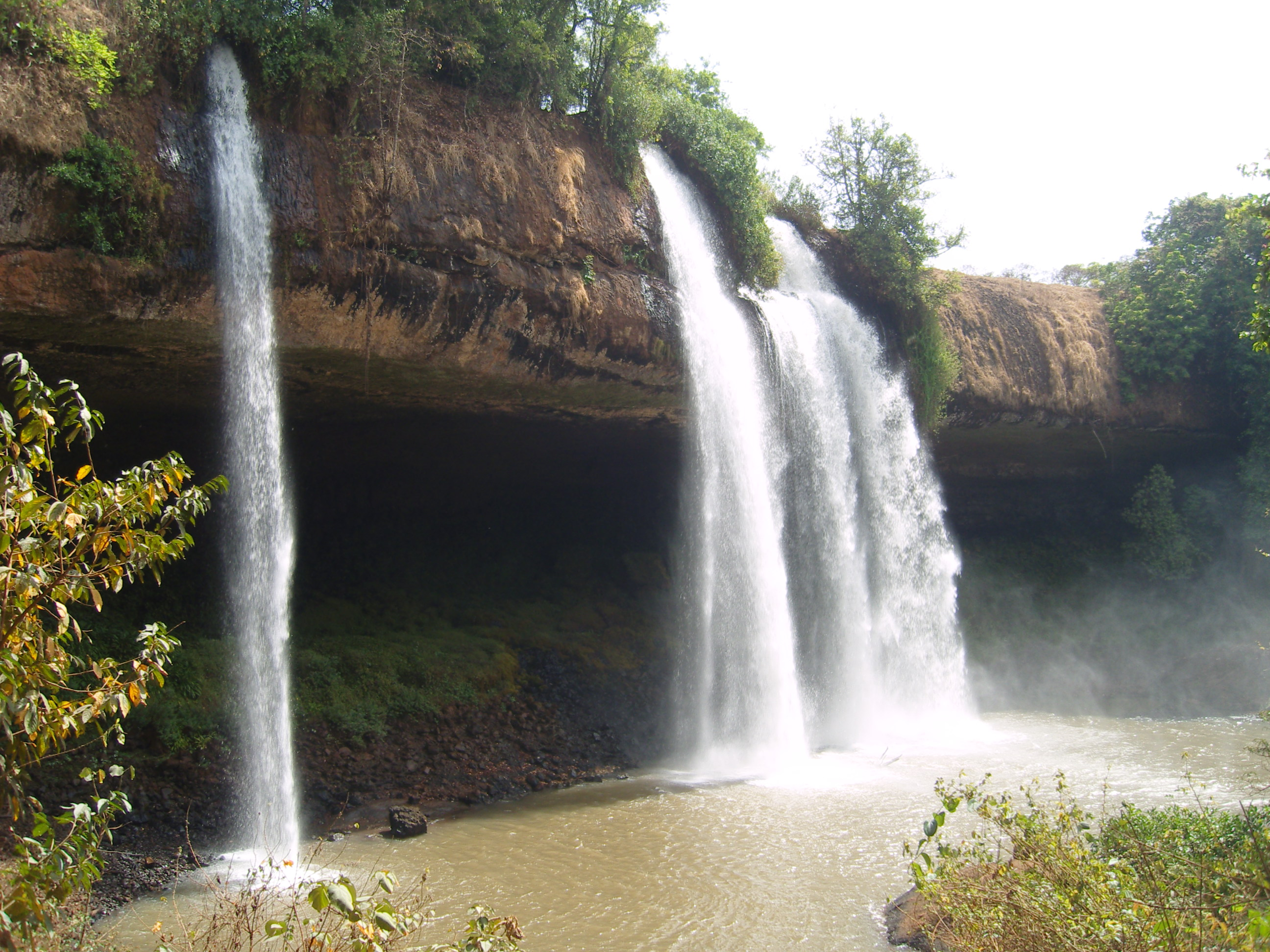 La chutes de Tello située à 50Km de Ngaoundéré dans la région de l'Adamaoua